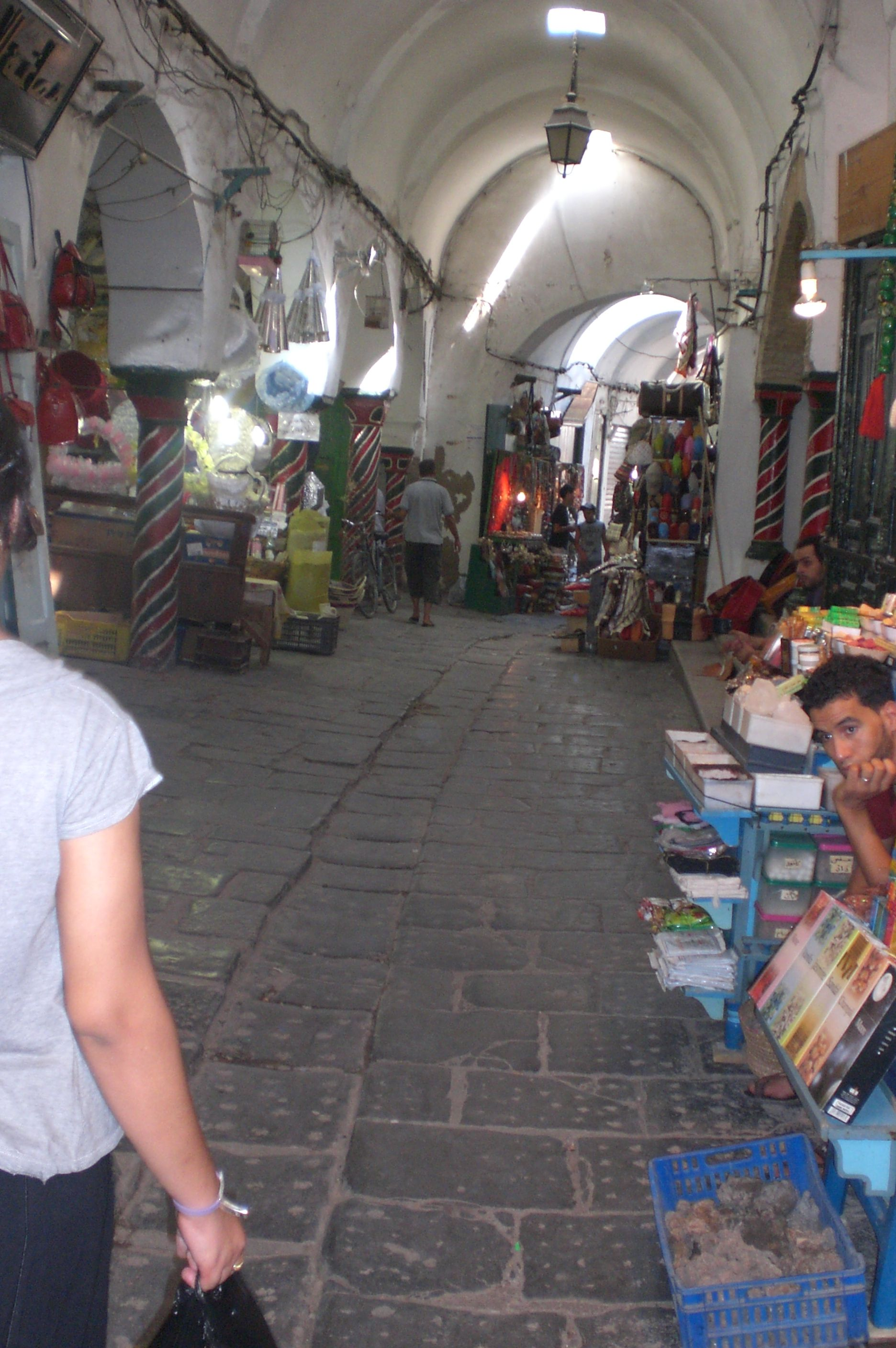 Souk el-Attarine- Tunis